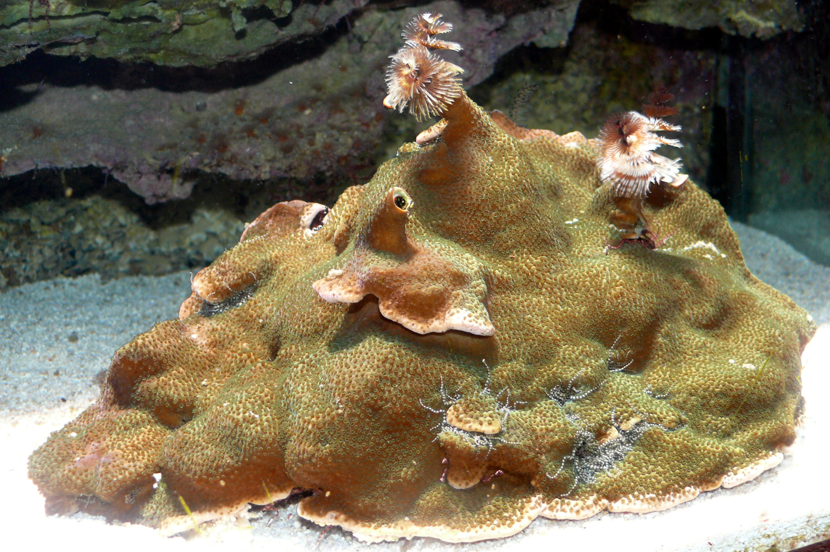 Porites